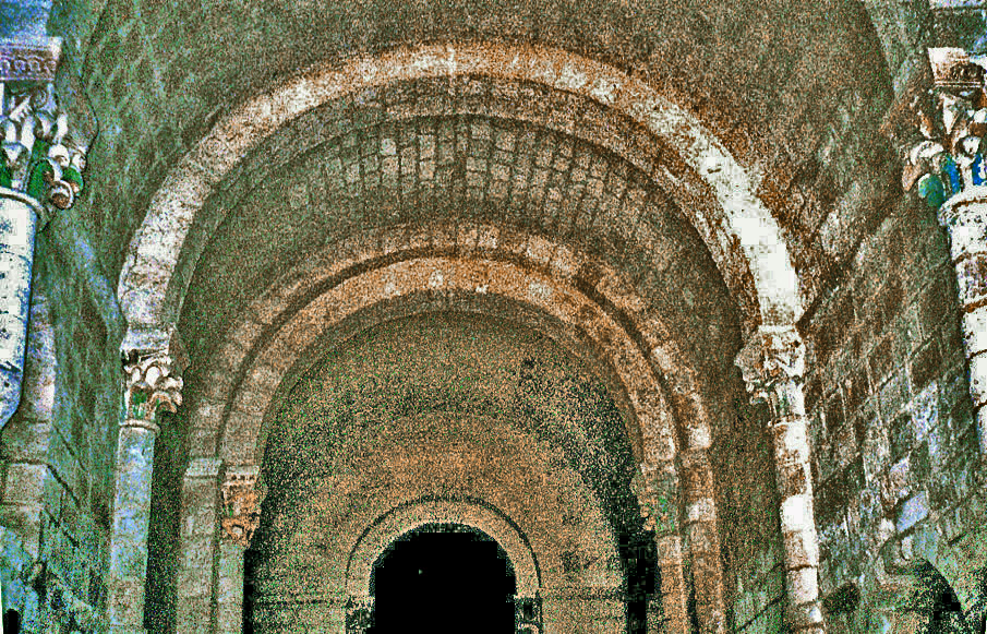 Berceau de l'église de Vianne .